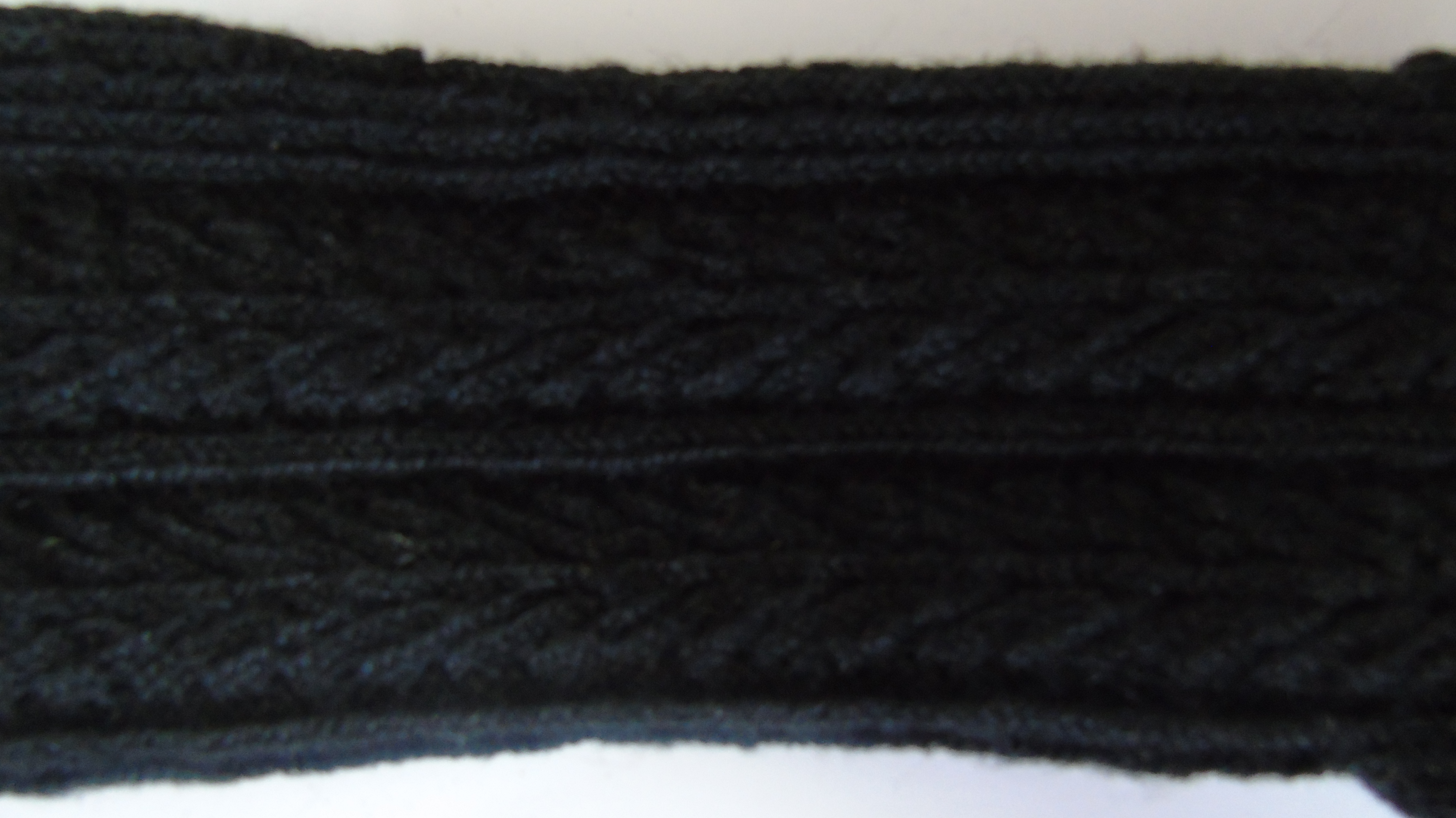 Српски (ћирилица): Мотив плета са црних ручно плетених вунених чарапа из Левча (Збирке чарапа Музеја у Трстенику) 3